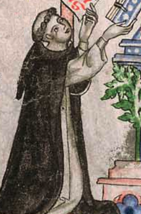 Frater Colda de Coldicz Ordinis Predicatorum (Bohemice Kolda z Koldic), scriptor bohemicus, Passionale abbatissae Cunegundis